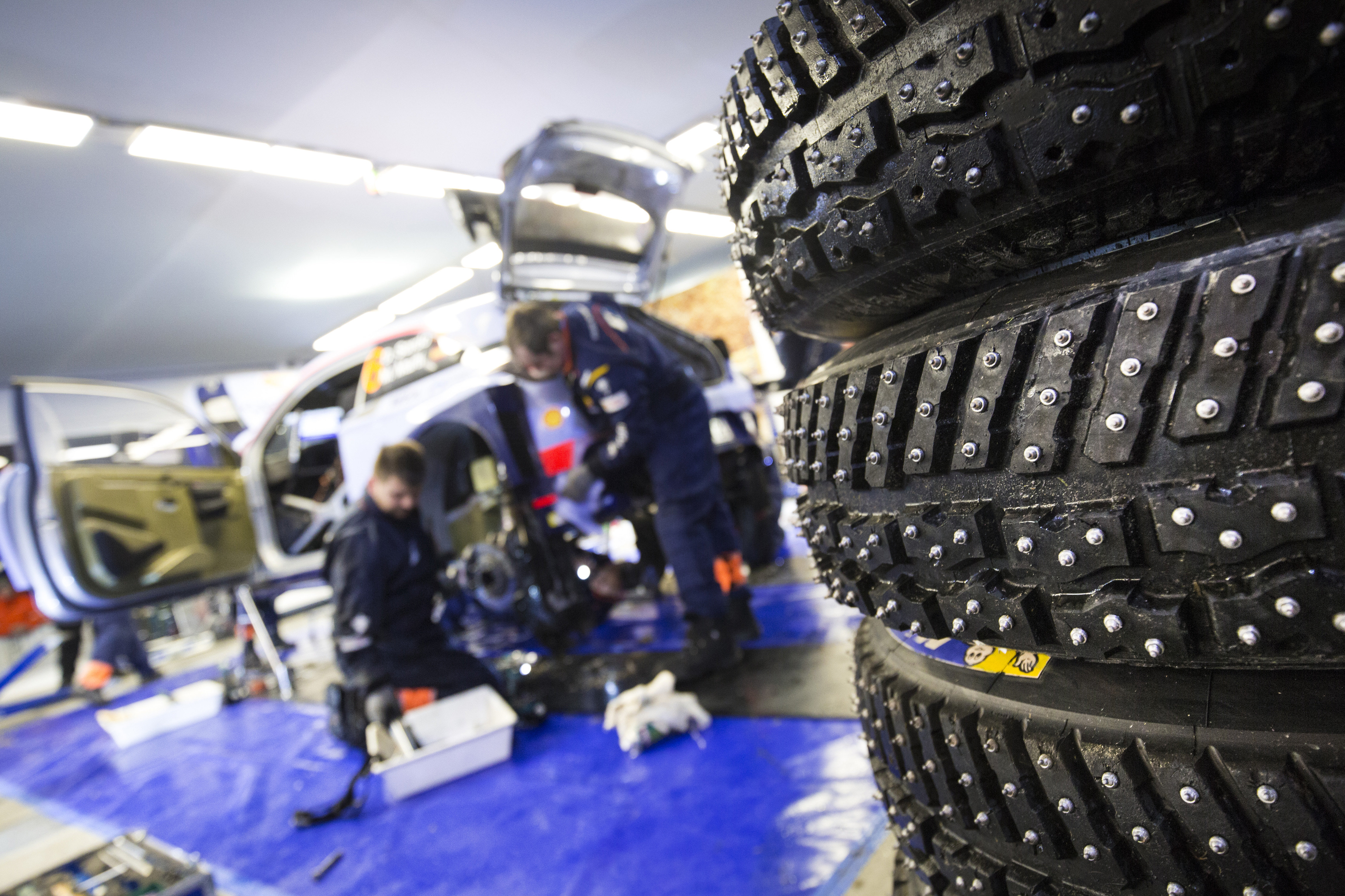 Hyundai Motorsport.